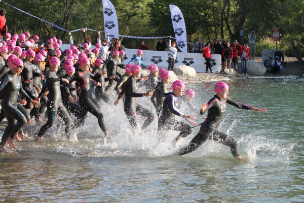 Départ féminine IMPA 2014